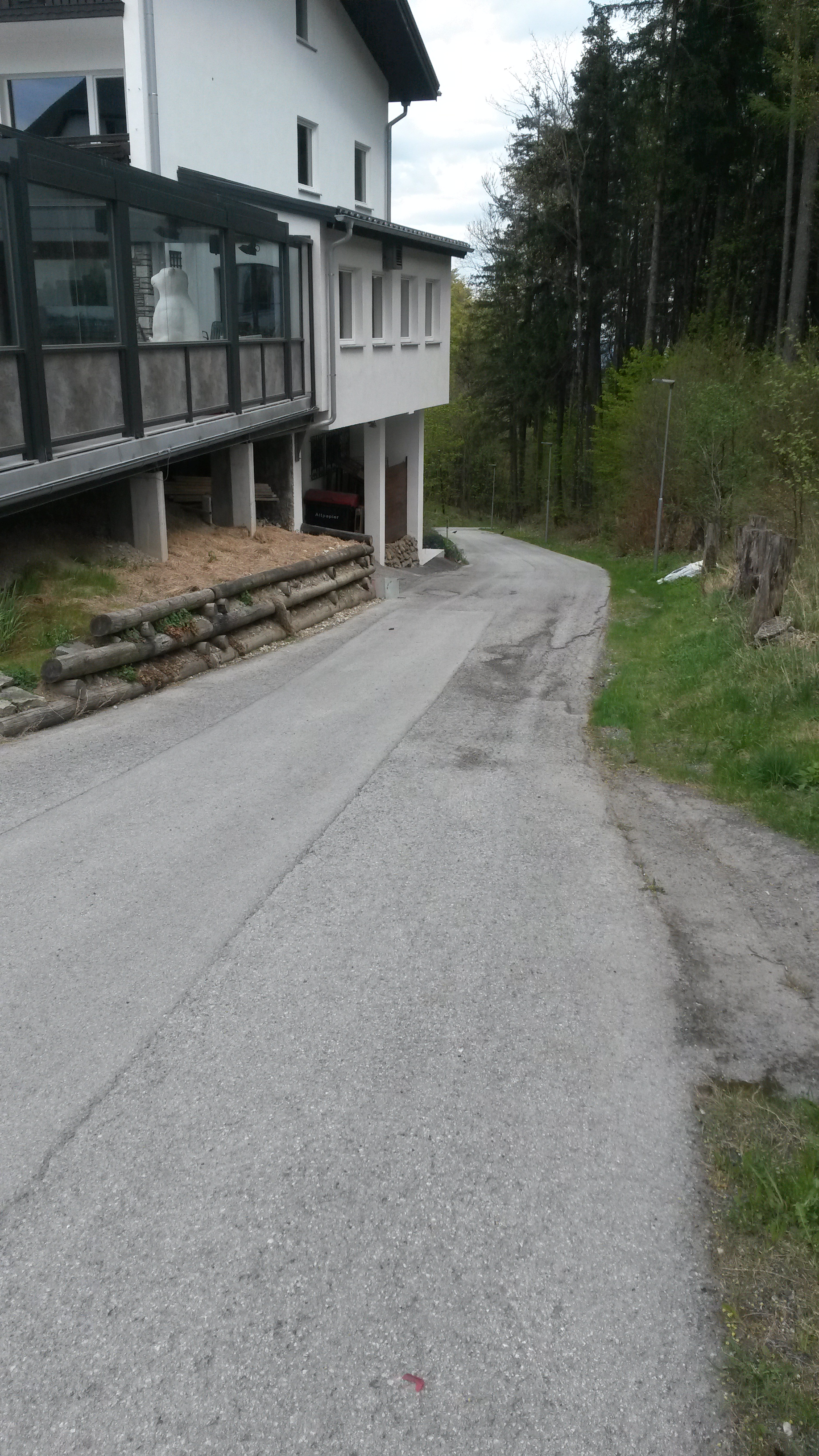 Teilstück der alten Semmeringstraße beim Restaurant Berghof, Passhöhe Semmering.